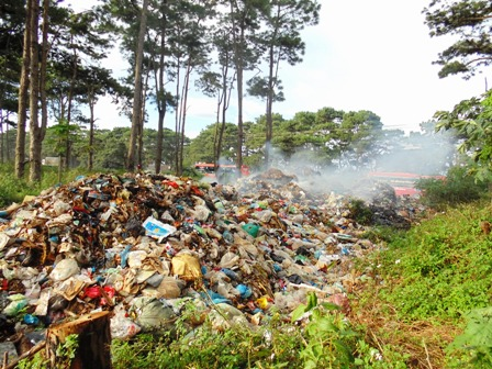 khí rác thải